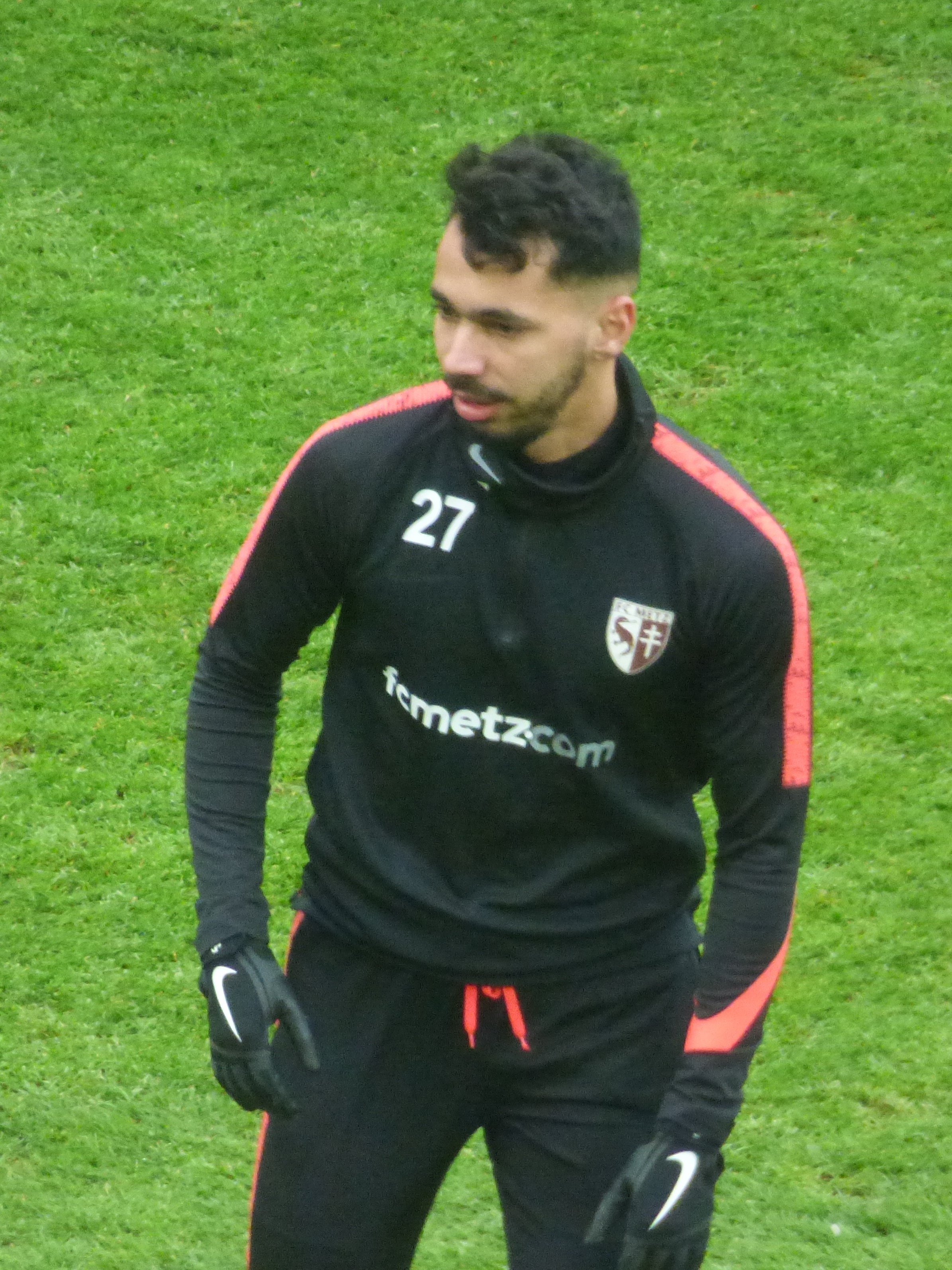 Farid Boulaya avant le match RC Lens / FC Metz, comptant pour la vingt-quatrième journée du championnat de France de Ligue 2 2018-2019, le 9 février 2019, au Stade Bollaert-Delelis.